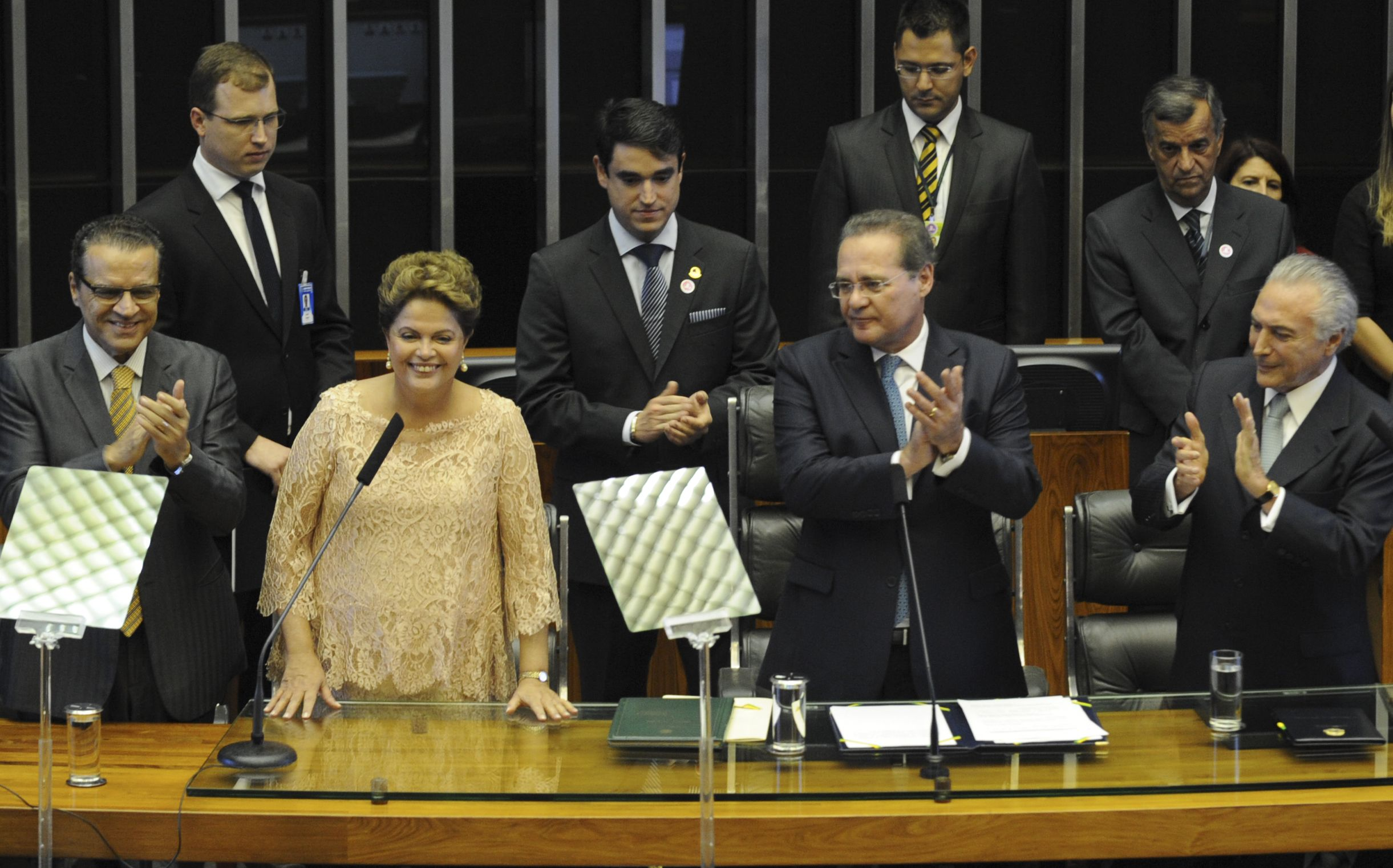 A presidenta do Brasil, Dilma Rousseff, durante cerimônia do Compromisso Constitucional, leitura do Termo de Posse e o pronunciamento no Congresso Nacional. Ao lado, o deputado Henrique Eduardo Alves (PMDB-RN, à esquerda), presidente da Câmara dos Deputados; Renan Calheiros (PMDB-AL, à direita), presidente do Senado; e Michel Temer (à esquerda de Renan, vice-presidente da República).